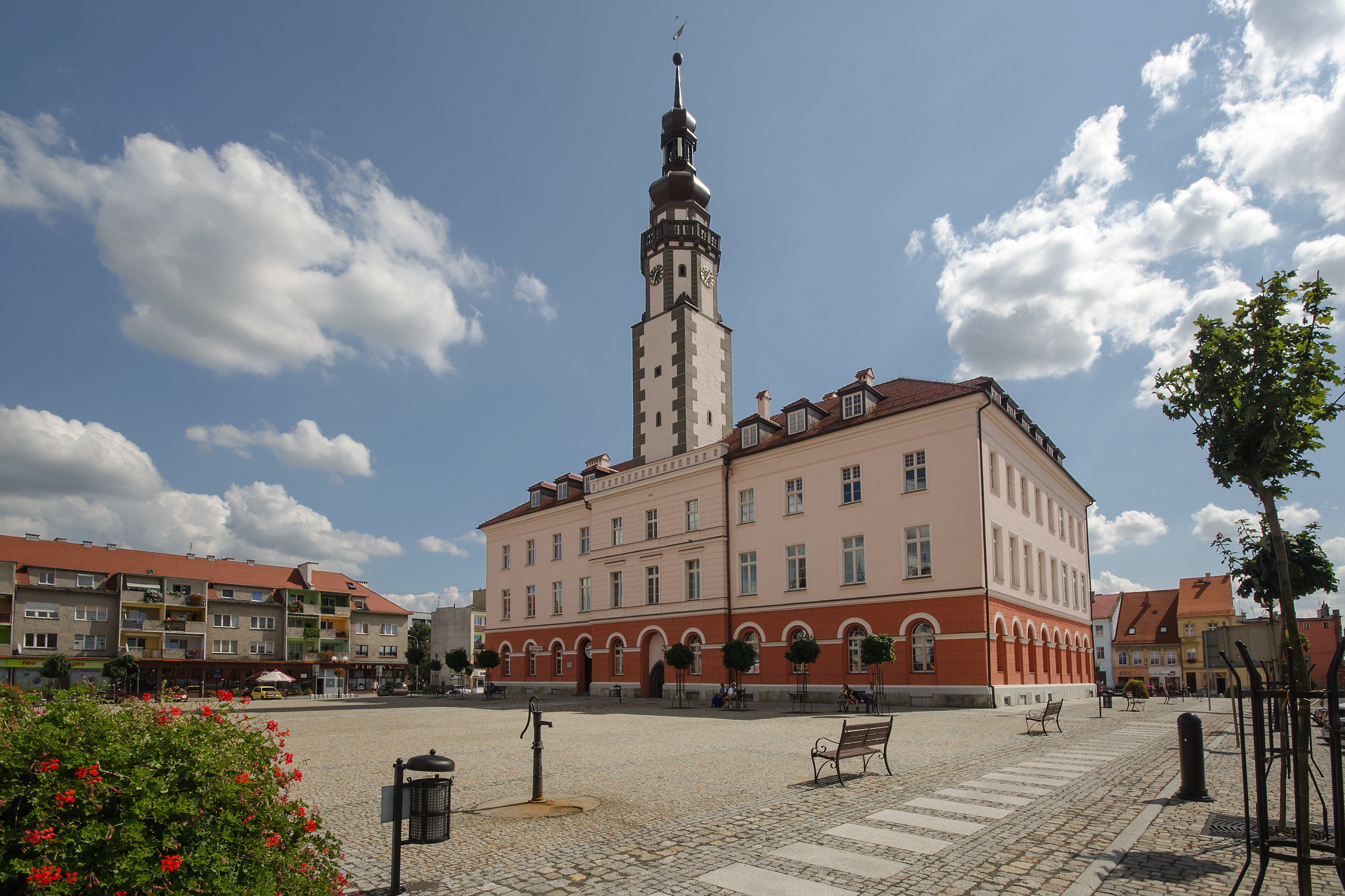 Grodków, ratusz, 1688, 1836-1840, l. 30. XX